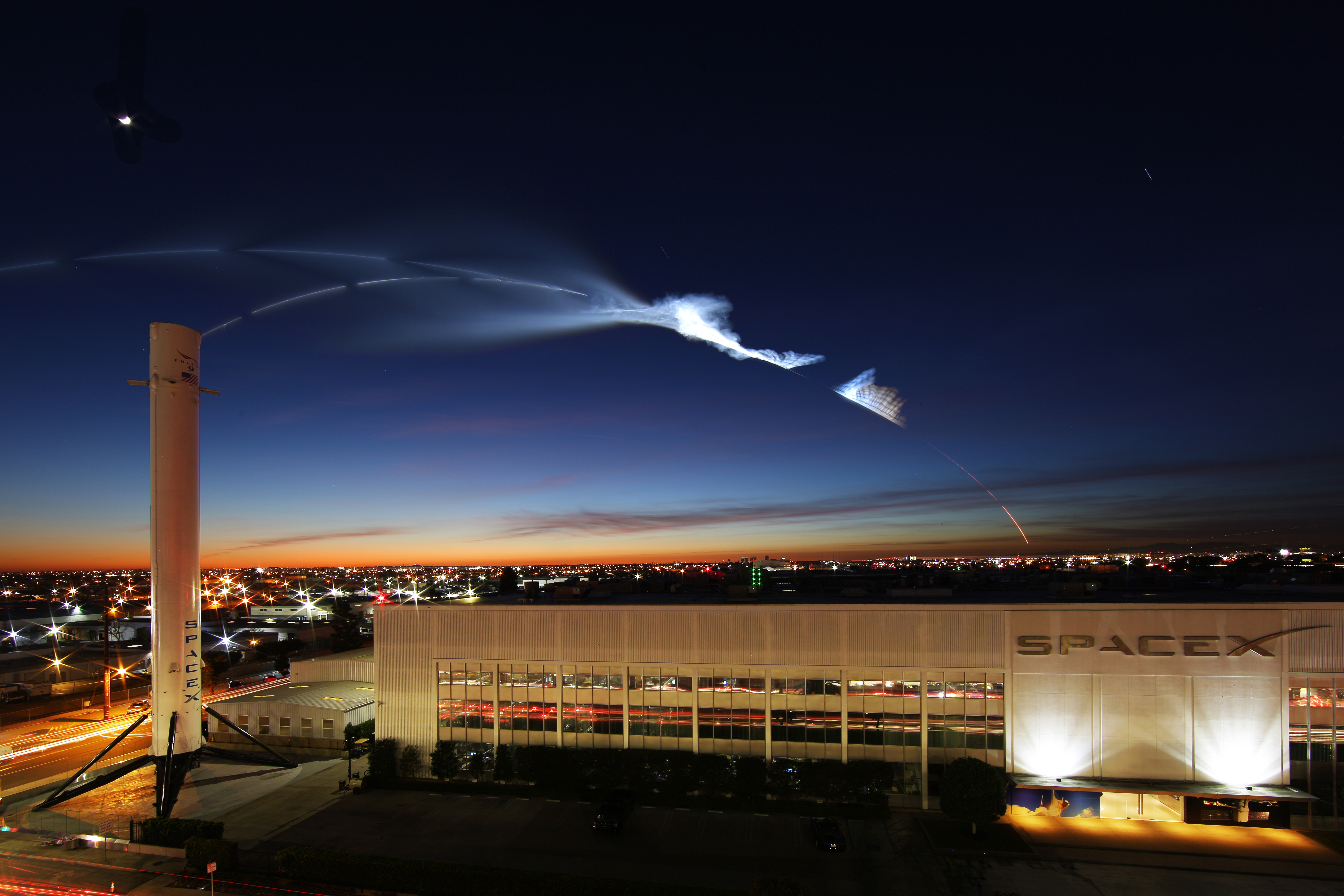 Iridium-4 Mission